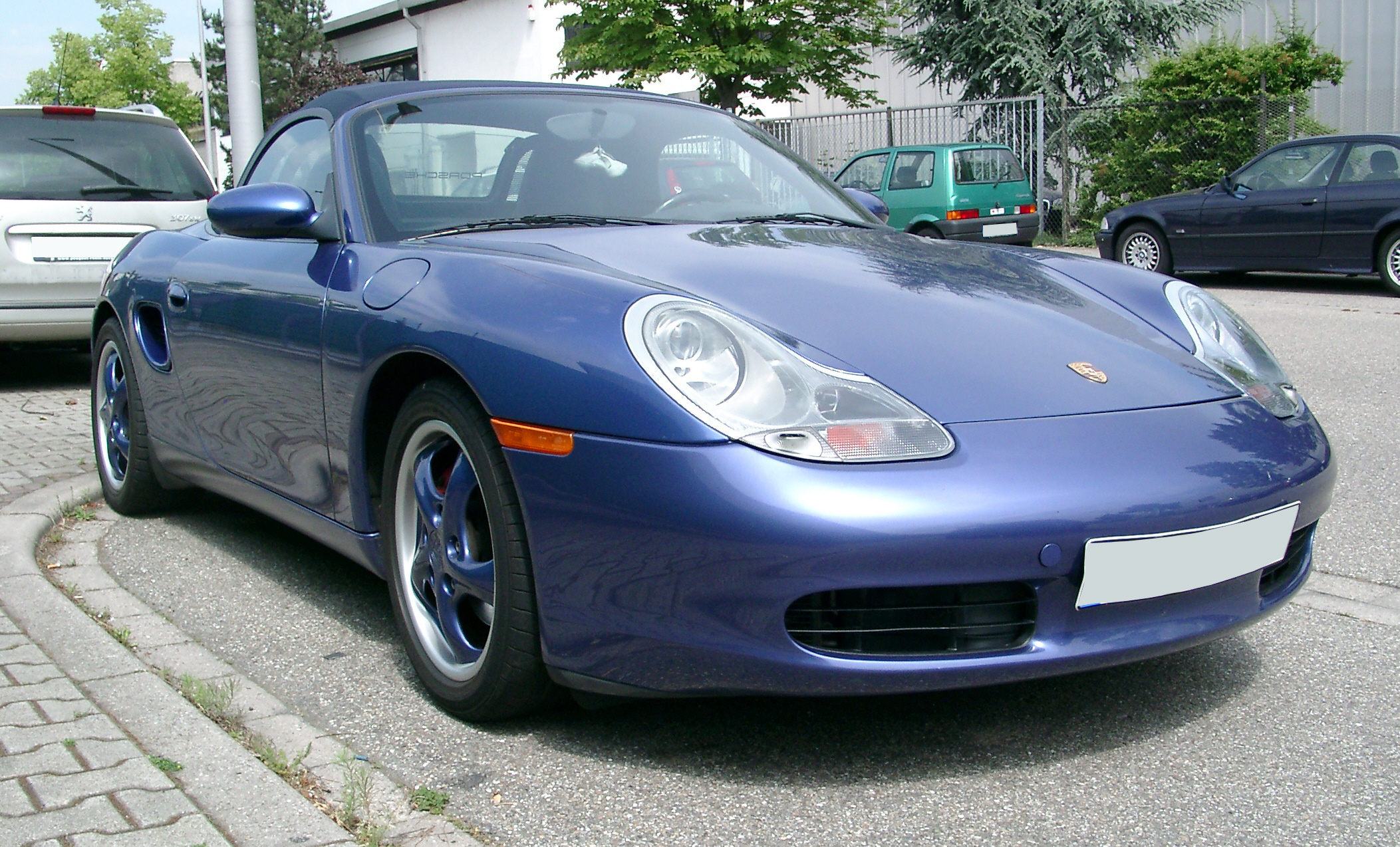 Porsche 986 Boxster